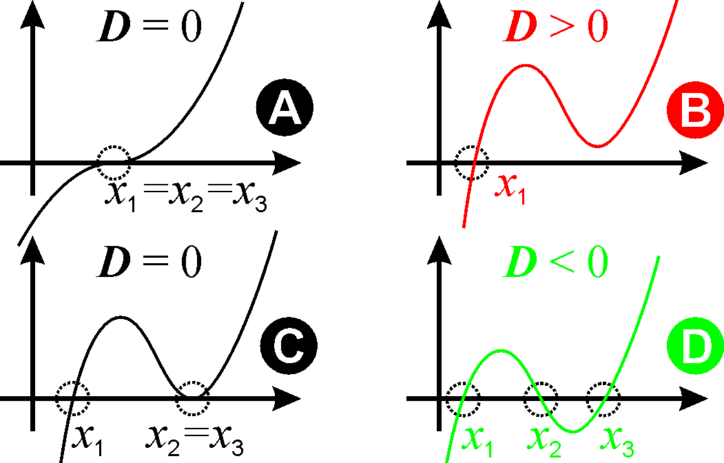 Kubische Gleichung Kubische Parabel und Zusammenhang zwischen Lage und Form der Parabel und der Anzahl der Nullstellen